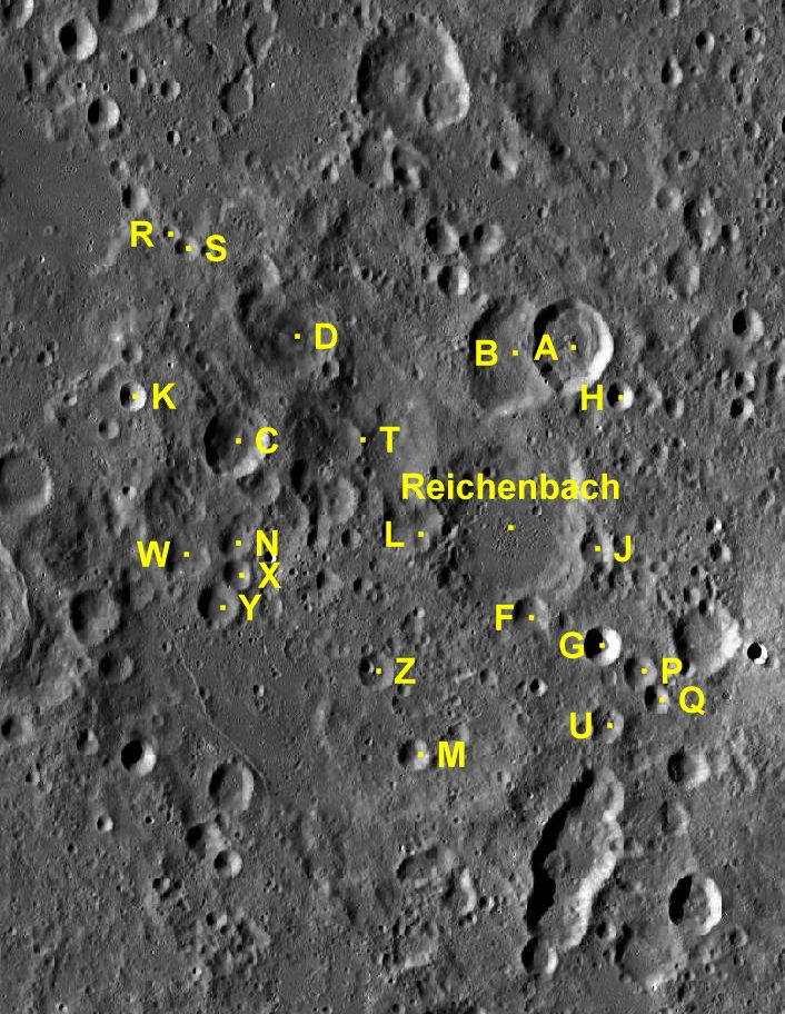 Cráter lunar Reichenbach. Cráteres satélite. (Imagen LRO)